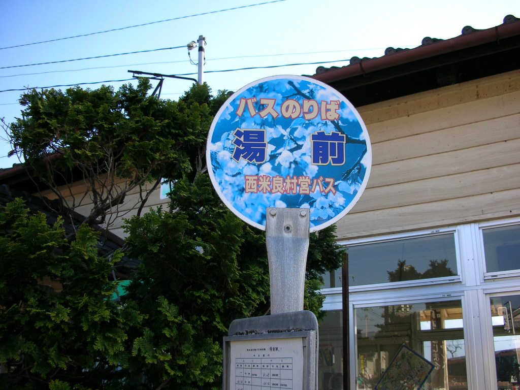 湯前駅前にて、撮影時期不明